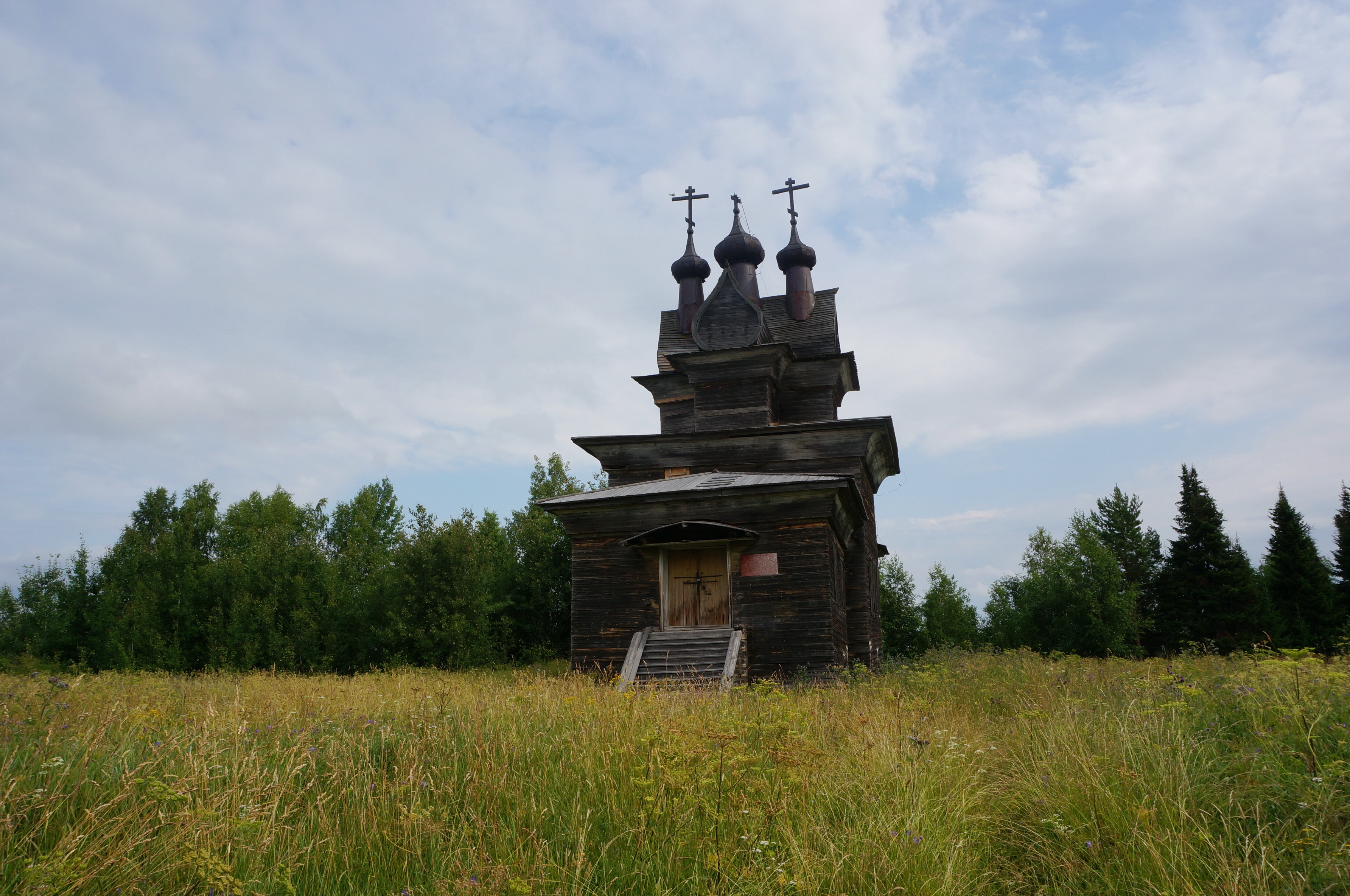 Церковь Георгиевская (деревянная) (Архангельская область, Котлас, село Пермогорье (д. Придворные места))